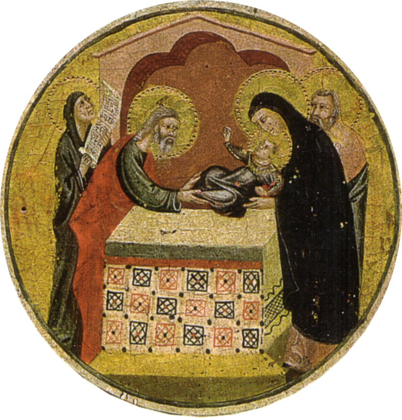 detail